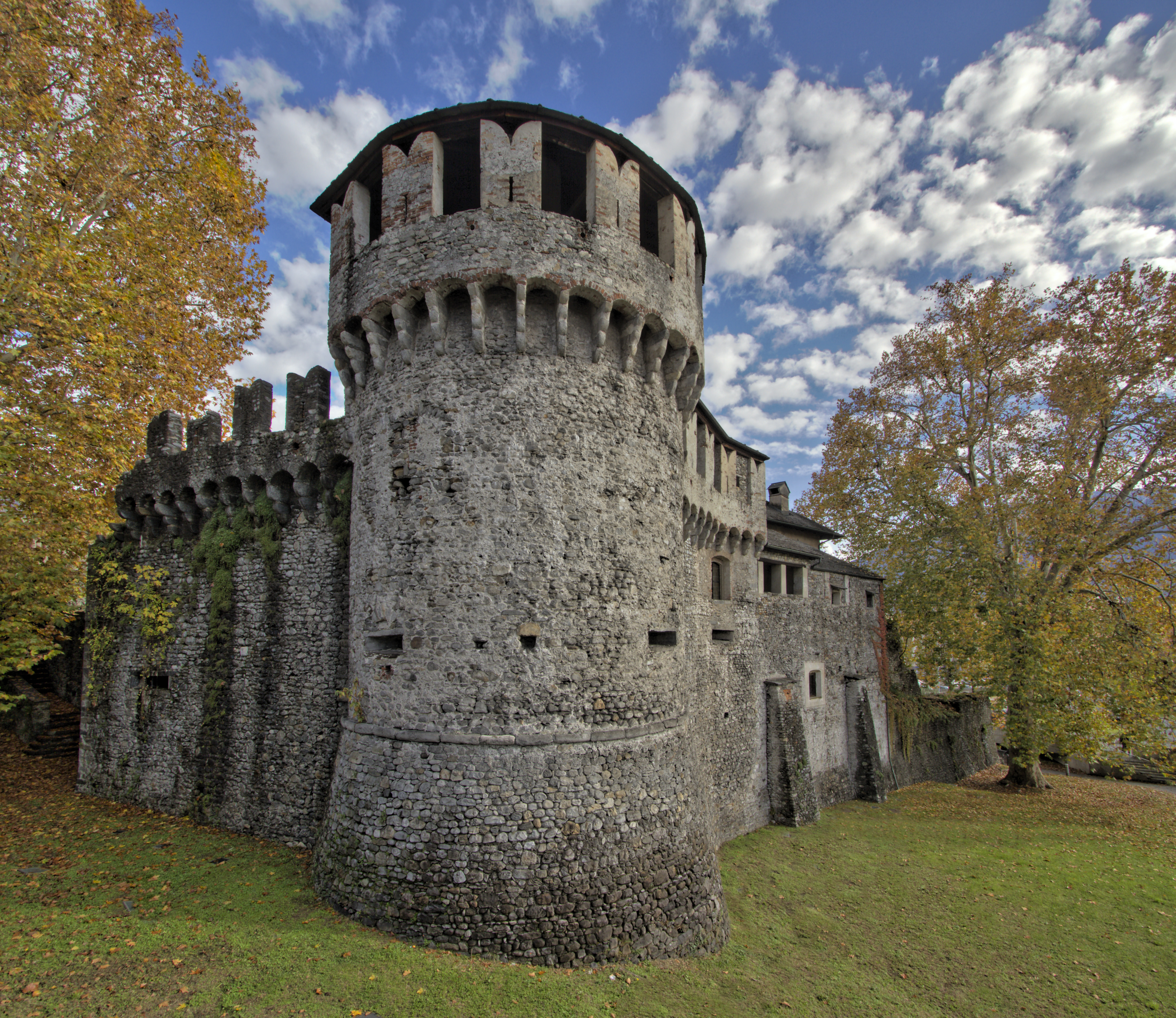 Locarno TI, Castello Visconteo